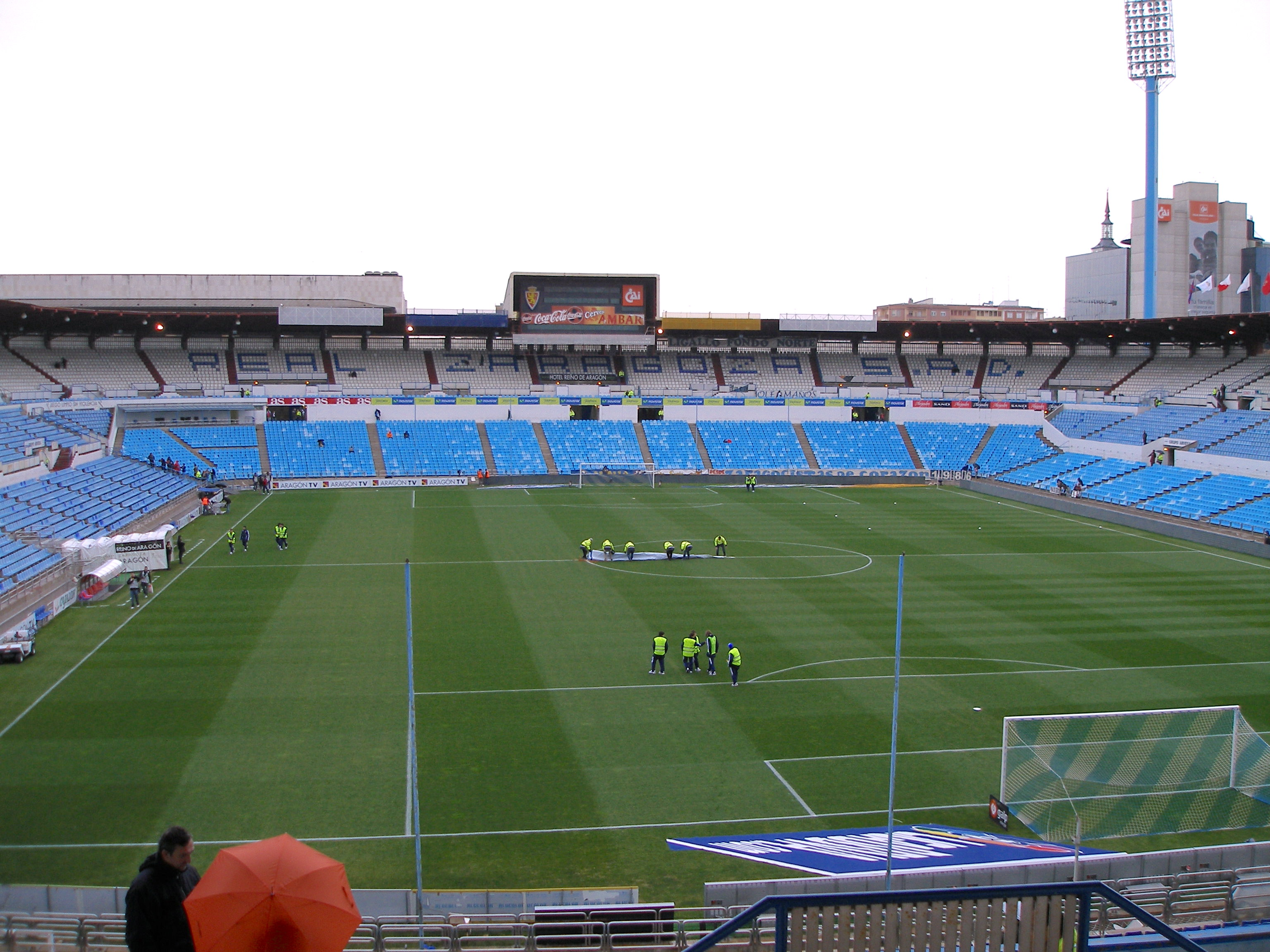 Estadio Municipal de La Romareda de Zaragoza dos horas antes del cominezo de un partido de Liga.